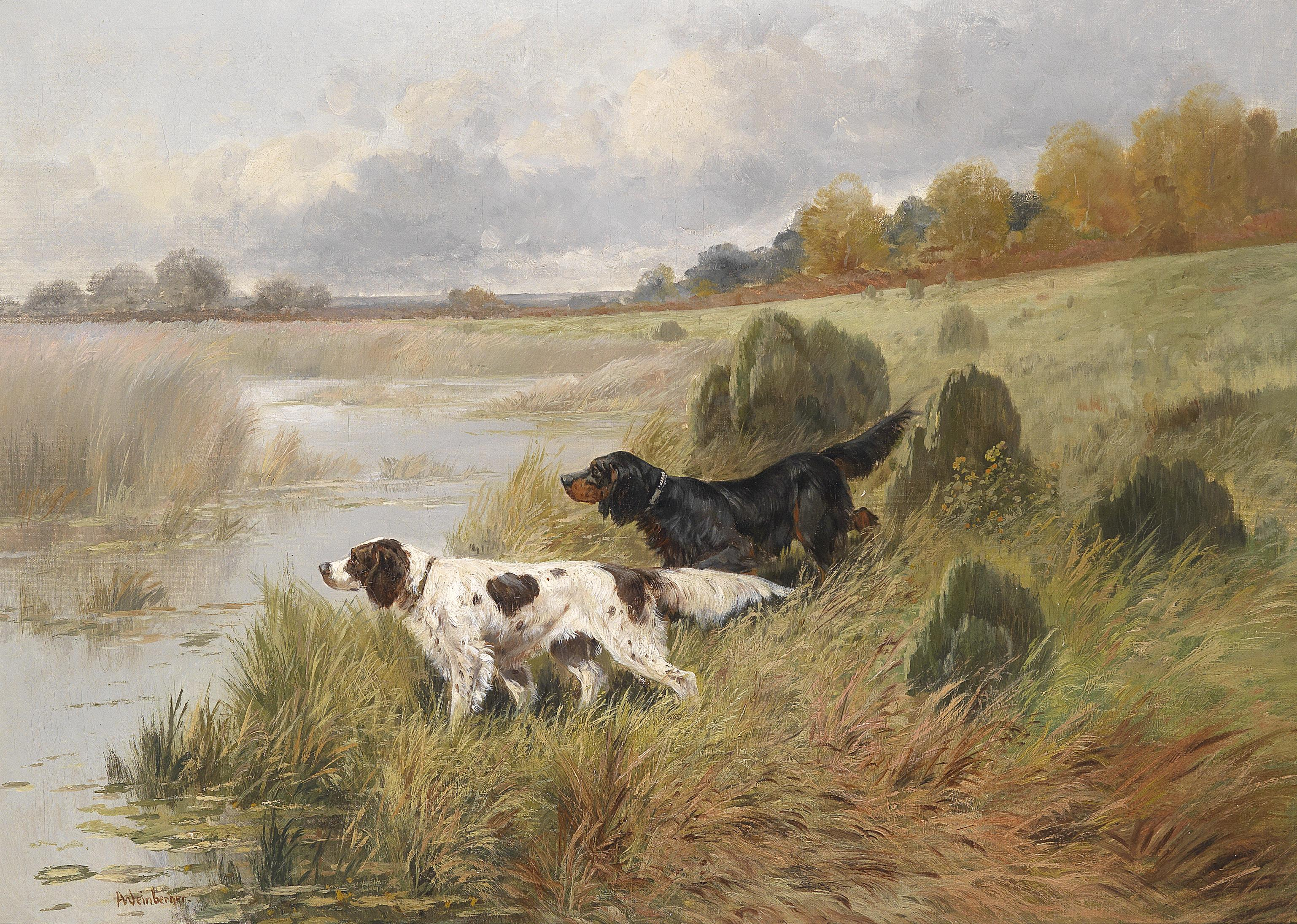 Vorstehhunde in einer weiten Landschaft, signiert A. Weinberger (ligiert), Öl auf Leinwand, 65,5 x 92 cm